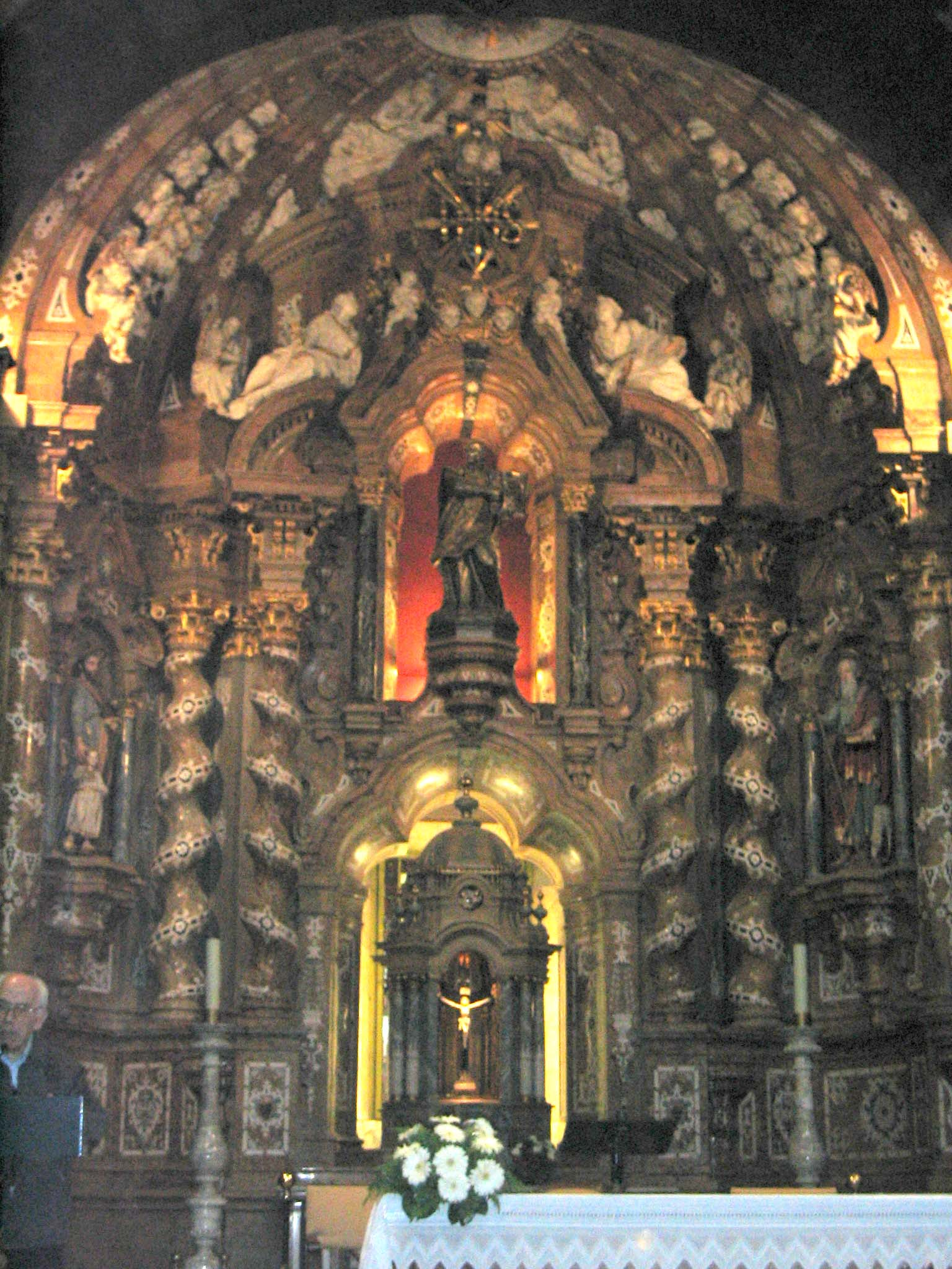 Altar Mayor. Santuario de Loiola, Azpeitia. Guipúzcoa, País Vasco (España).